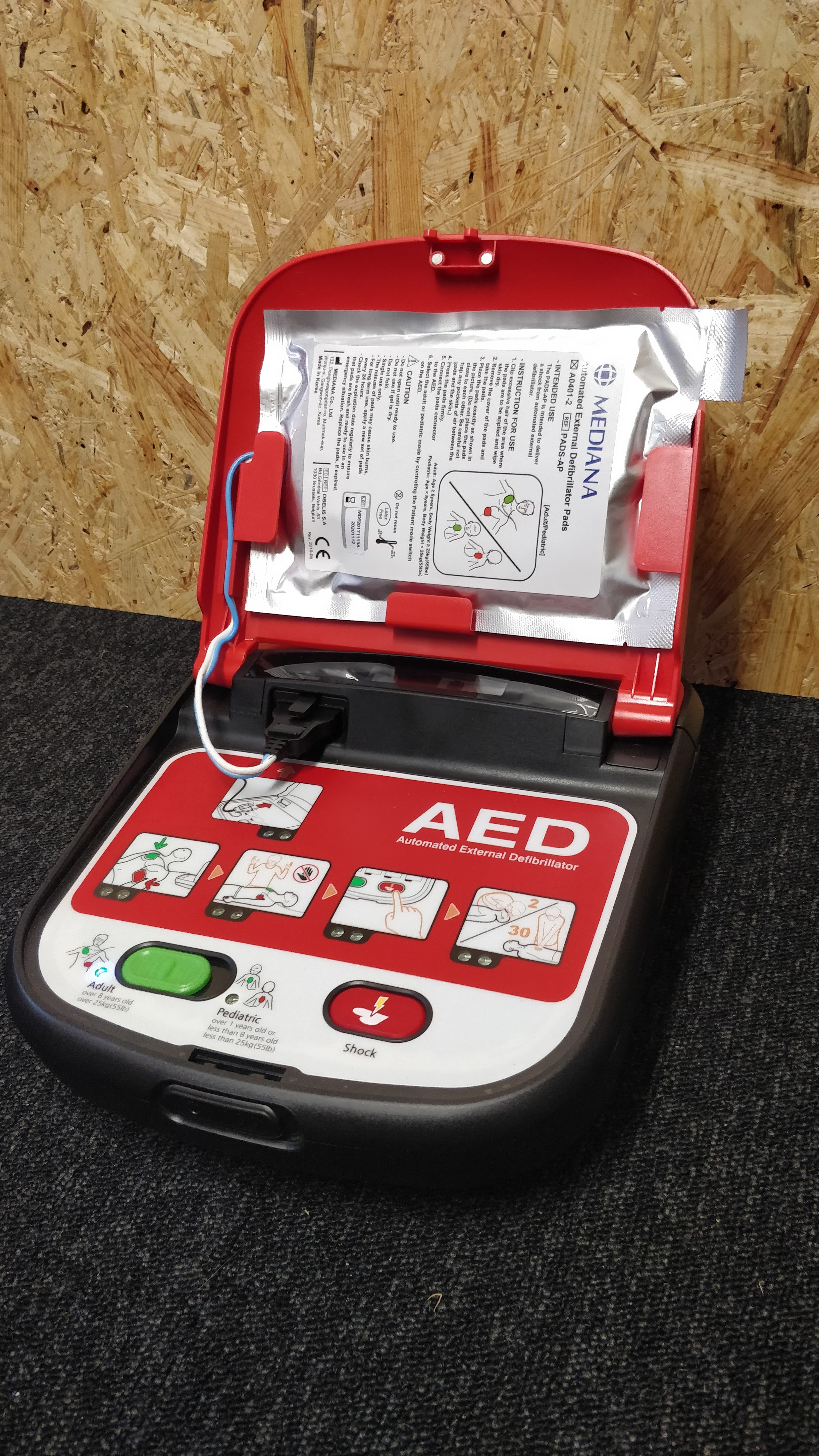 Børneknap